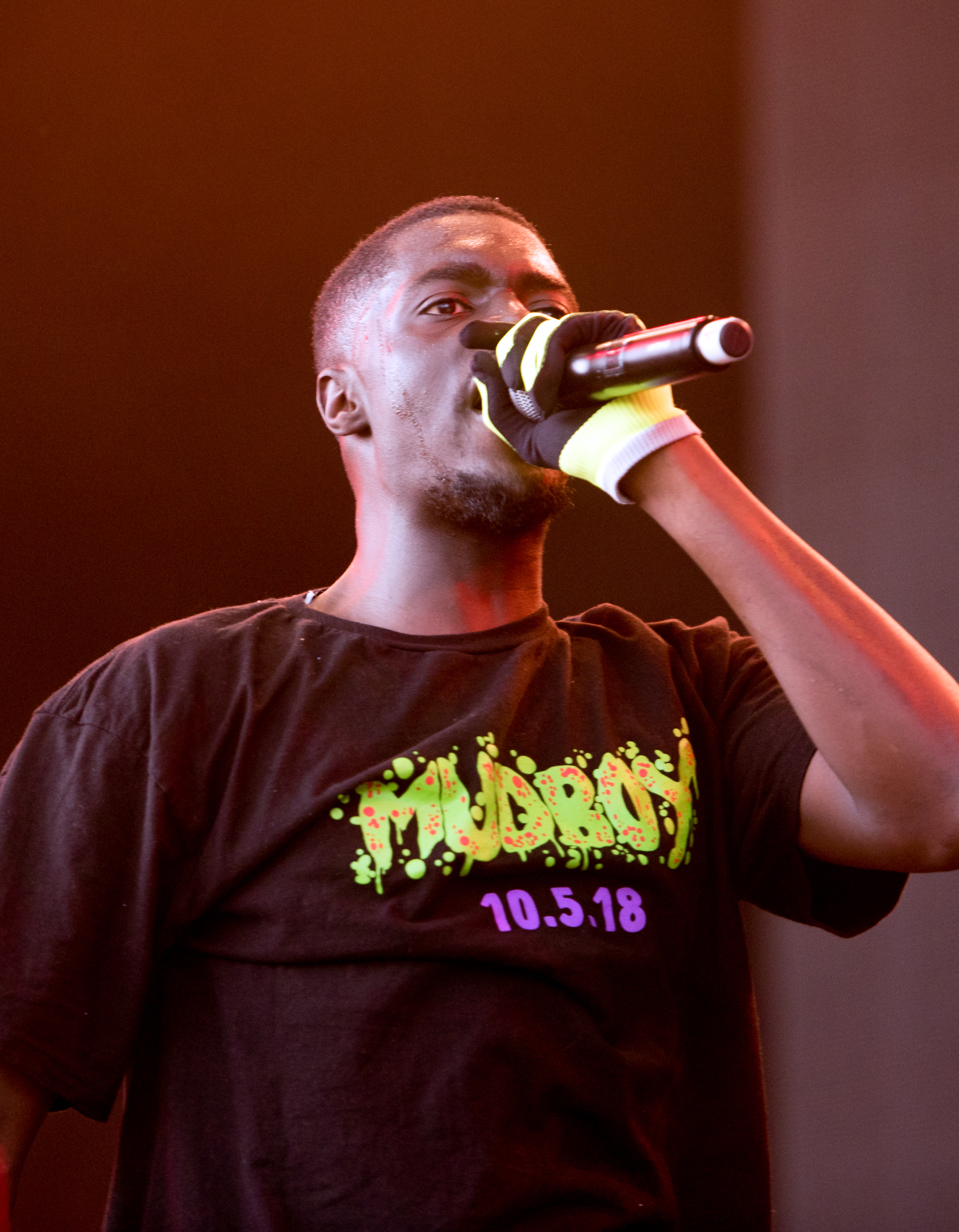 Sheck Wes live auf dem Openair Frauenfeld 2019